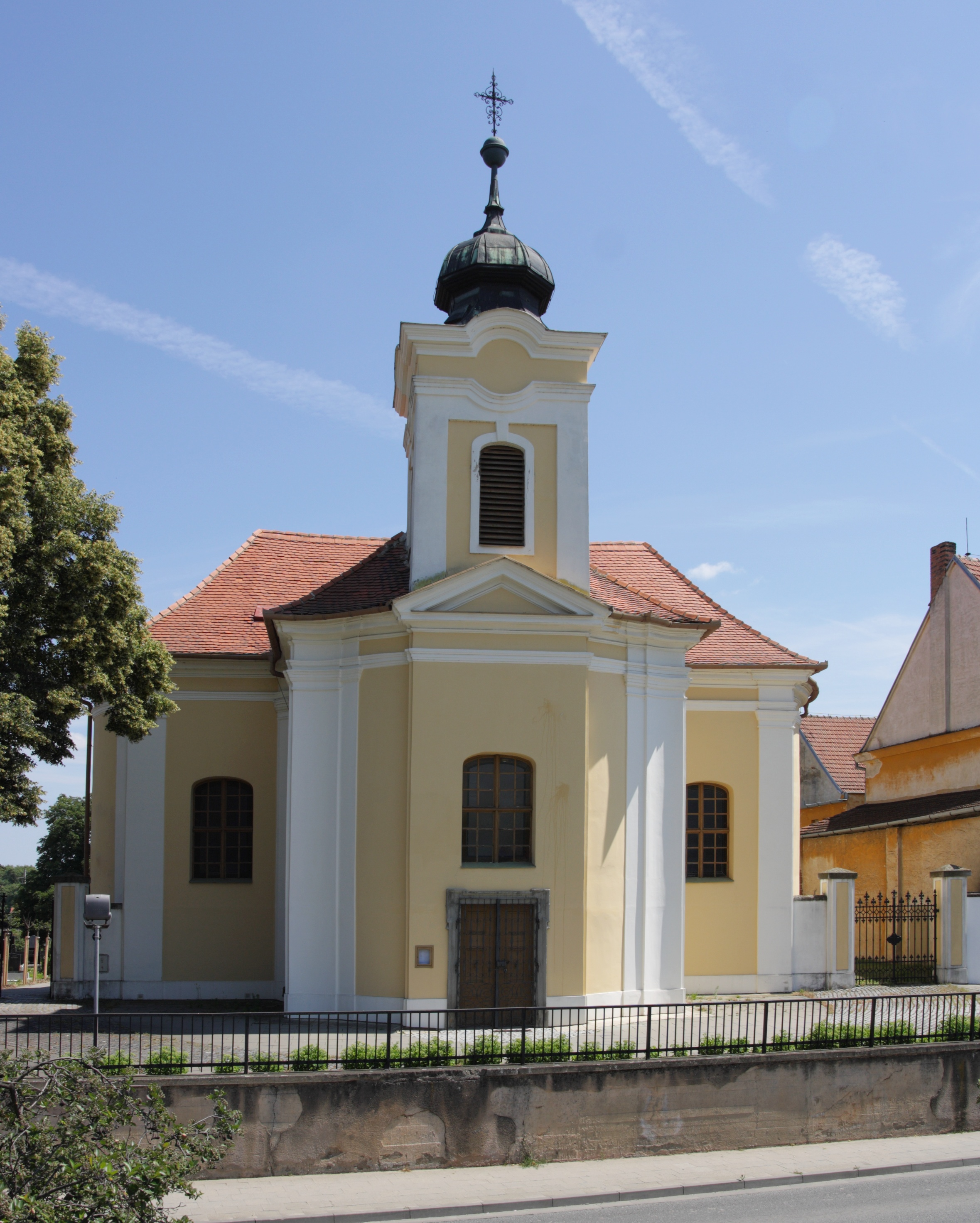 Rajhrad - kostel Povýšení svatého Kříže.